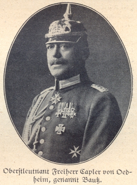 Oberstleutnant Frhr. Hans Wolfgang Capler von Oedheim genannt Bautz, 11. Dezember 1914 Kommandeur des Dragonerregiments „Königin Olga“ (1. württembergisches) Nr. 25, † 2. Mai 1917